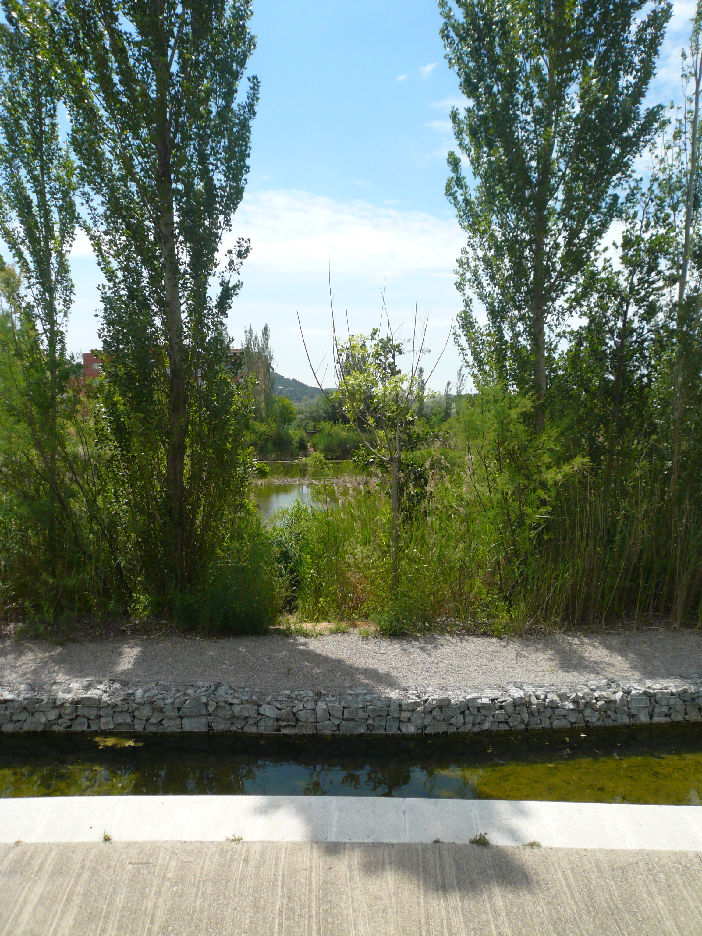 Llacunes de Mas Duran (Vallès Occidental) (Montcada i Reixac). Graveres, argileres i similars. This is a a photo of a wetland in Catalonia, Spain, with id: IZHC-06004002 Object location41° 29′ 45.78″ N, 2° 10′ 34.46″ E